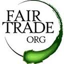 Fair_Trade_Återförsäljarna_logo